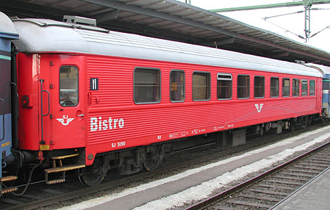 Restaurangvagn i Göteborg